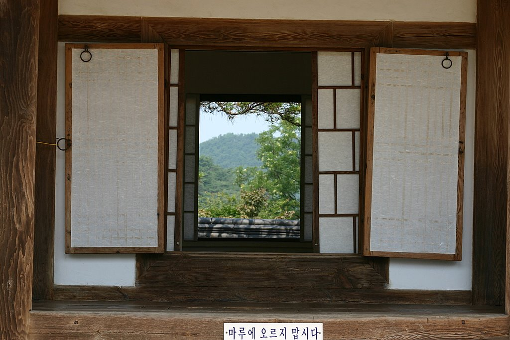 Hahoe Folk Village in Andong, Gyeongsangbuk-do, South Korea.